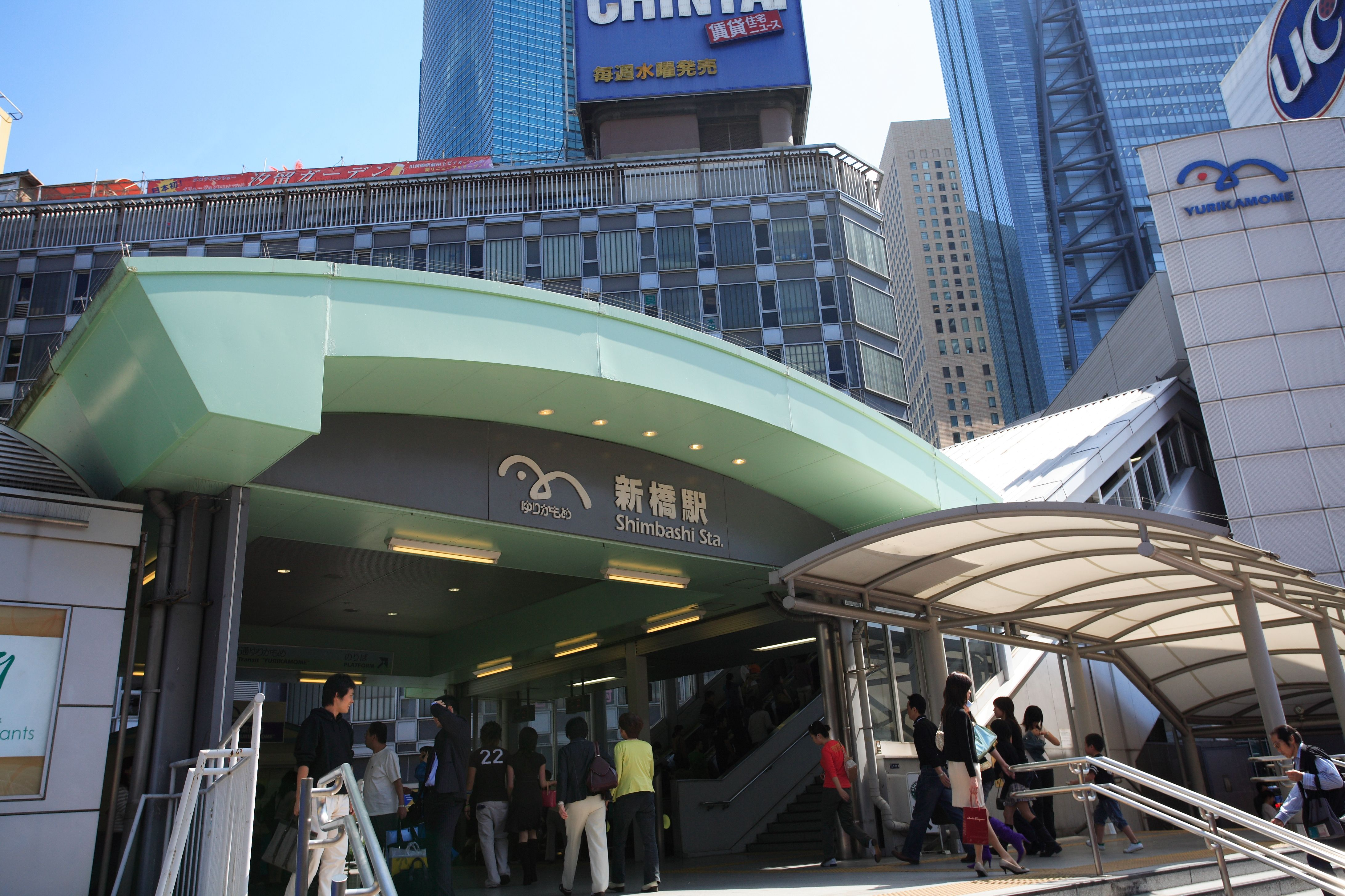 Yurikamome Shinbashi Station, Minato Ward, Tokyo, Japan.